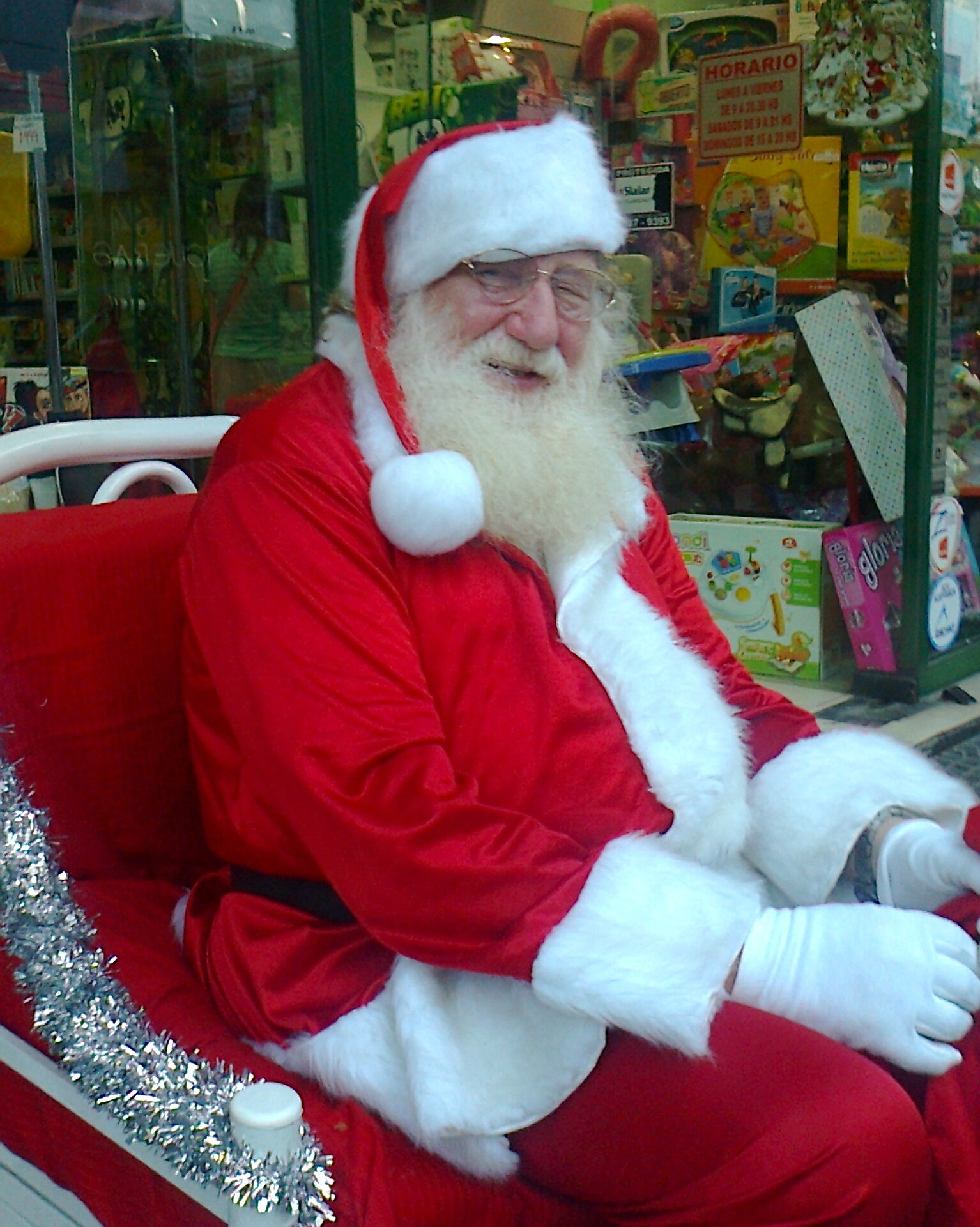 Papa Noel en la puerta de una jugueteria. Buenos Aires. Diciembre 2013.